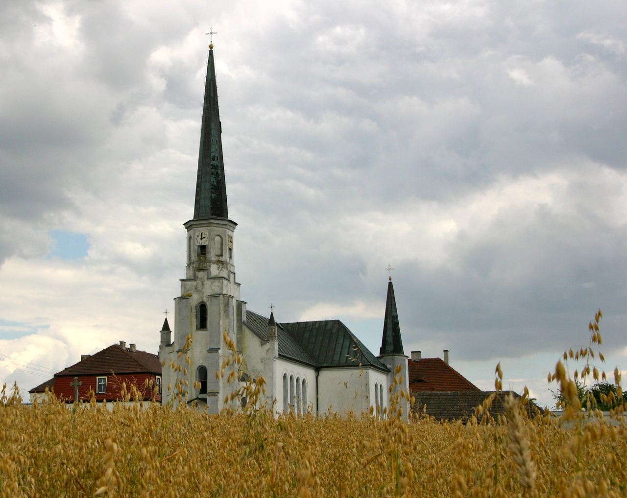 Grabina - rzymskokatolicki kościół parafialny p.w. Matki Boskiej Szkaplerznej.